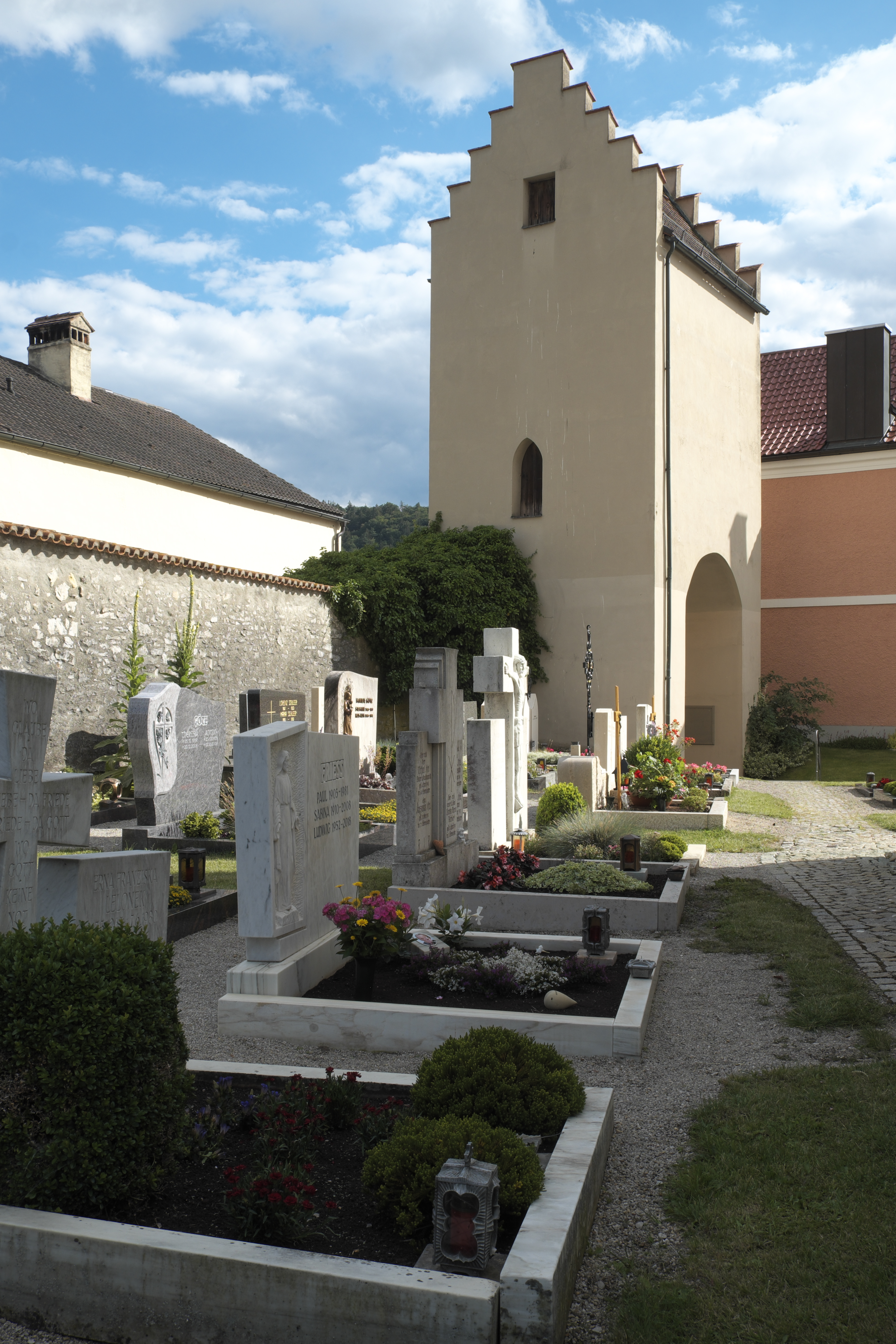 Katholische Pfarrkirche St. Vitus in Kottingwörth (Beilngries) im oberbayerischen Landkreis Eichstätt (Bayern/Deutschland)